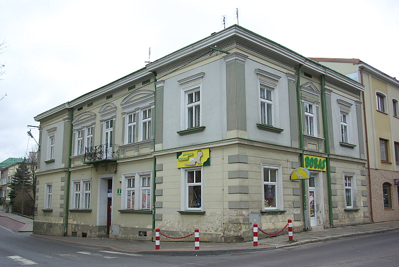 Budynek Sienkiewicza 2 Sanok widok od Kościuszki